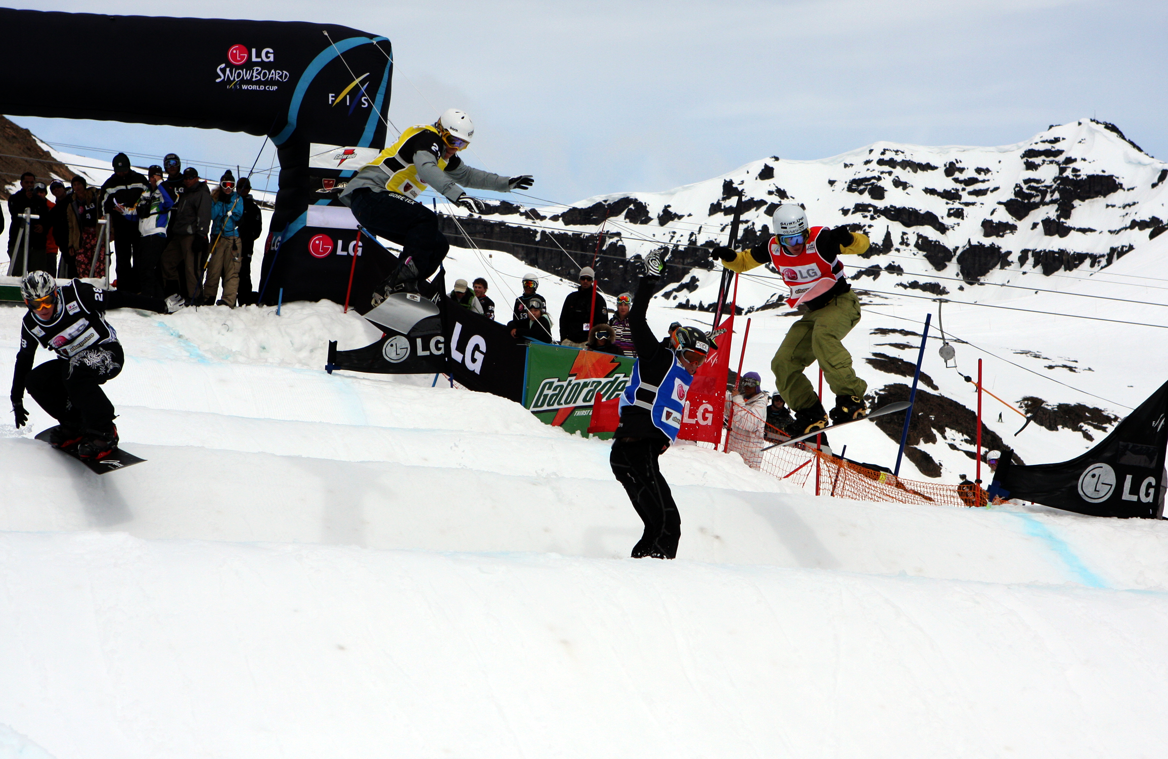 chapelco_sbx_andrey_boldykov_rus_konstantin_schad_ger_david_bakes_cze_paul-henri_de_le_rue_fra